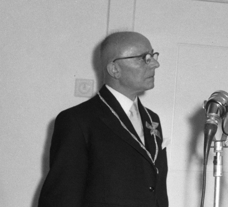 Collectie / Archief : Fotocollectie Anefo Reportage / Serie : [ onbekend ] Beschrijving : Opening nieuwe gemeentehuis te Heusden door koningin Juliana. Onthulling steen Datum : 11 september 1956 Locatie : Heusden, Noord-Brabant Trefwoorden : gemeentehuizen, onthullingen, openingen Persoonsnaam : Juliana (koningin Nederland), Juliana, koningin Fotograaf : Bilsen, Joop van / Anefo Auteursrechthebbende : Nationaal Archief Materiaalsoort : Negatief (zwart/wit) Nummer archiefinventaris : bekijk toegang 2.24.01.04 Bestanddeelnummer : 907-9943